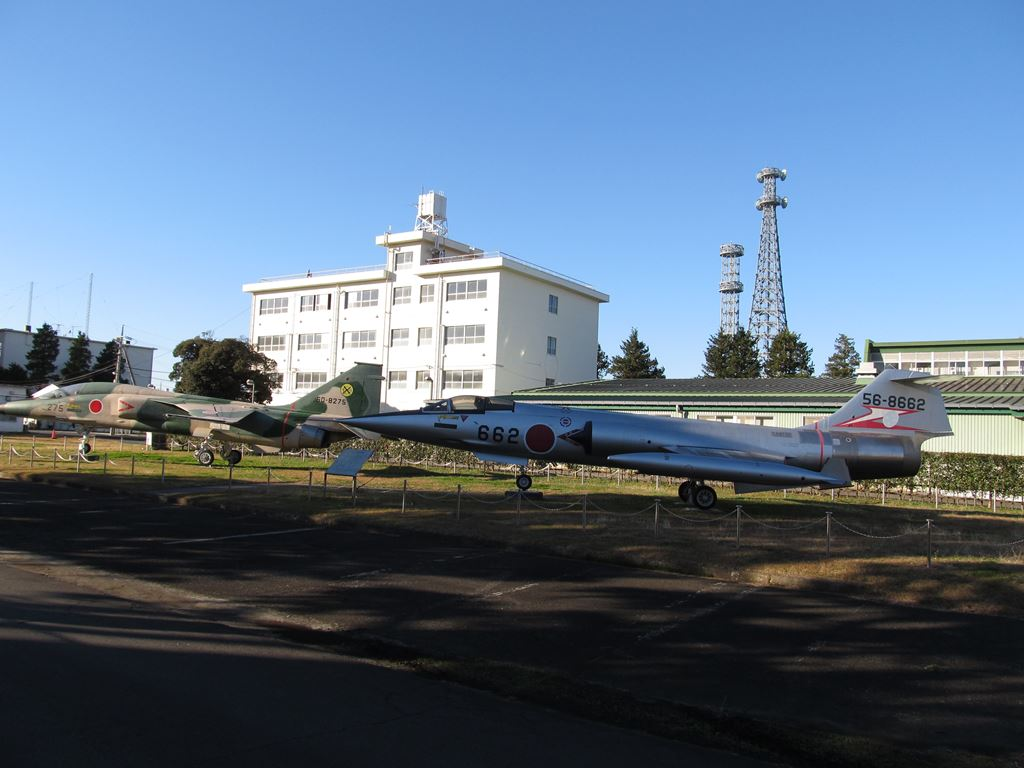 府中基地 東京都府中市浅間町